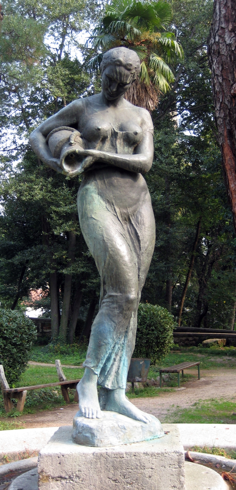 Hygia, 1955.-1956., bronca, skulptura Zvonka Cara, Rijeka